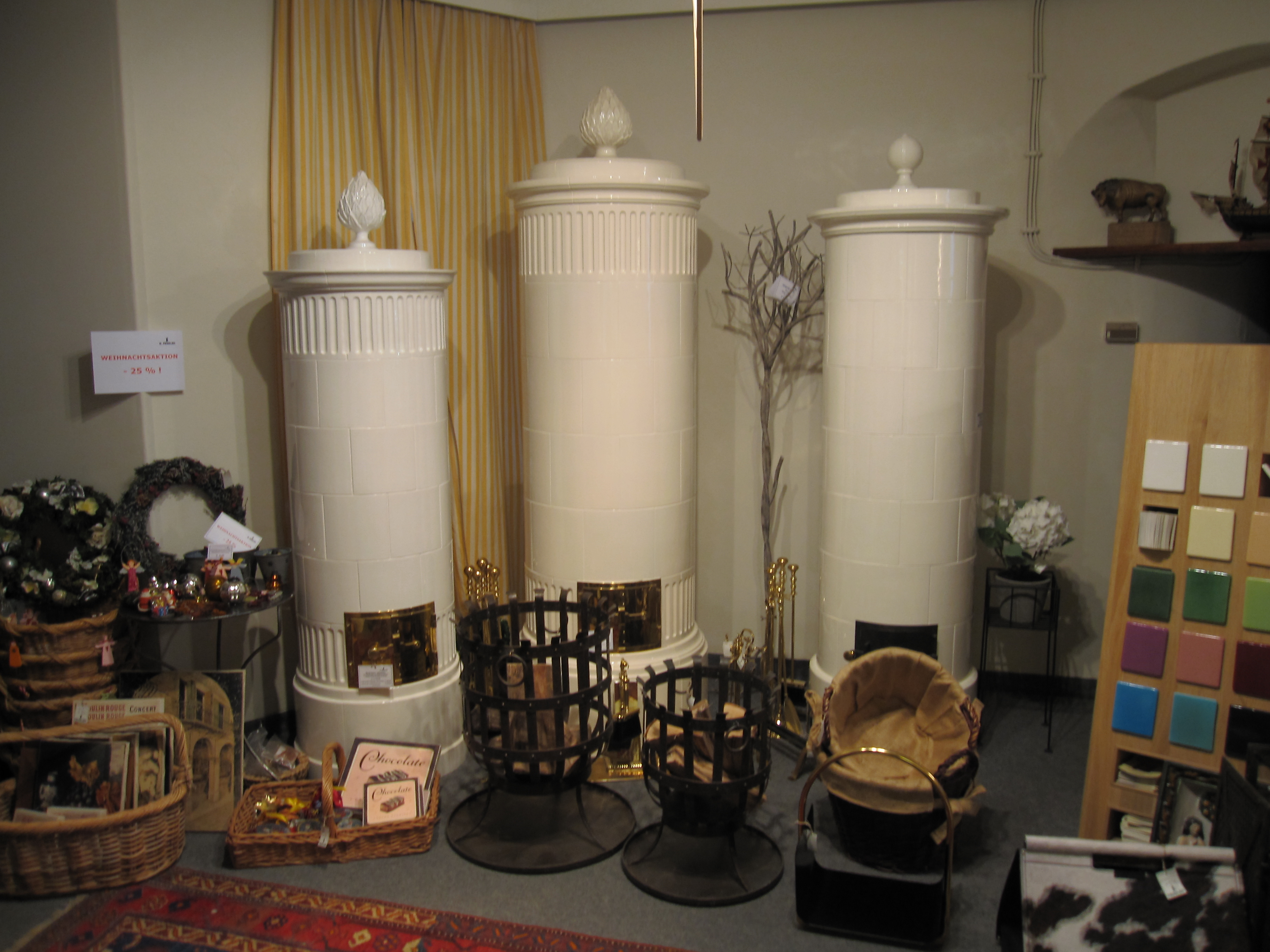 Biedermeier-Rundöfen (links) von E. Fessler. Durchmesser: 56 cm, 65 cm oder 72 cm, Gesamthöhe: 185 cm bis. 255 cm. Haydn Ofen (rechts), Höhe: 205 cm (ohne Vase), Durchmesser: 56 cm.